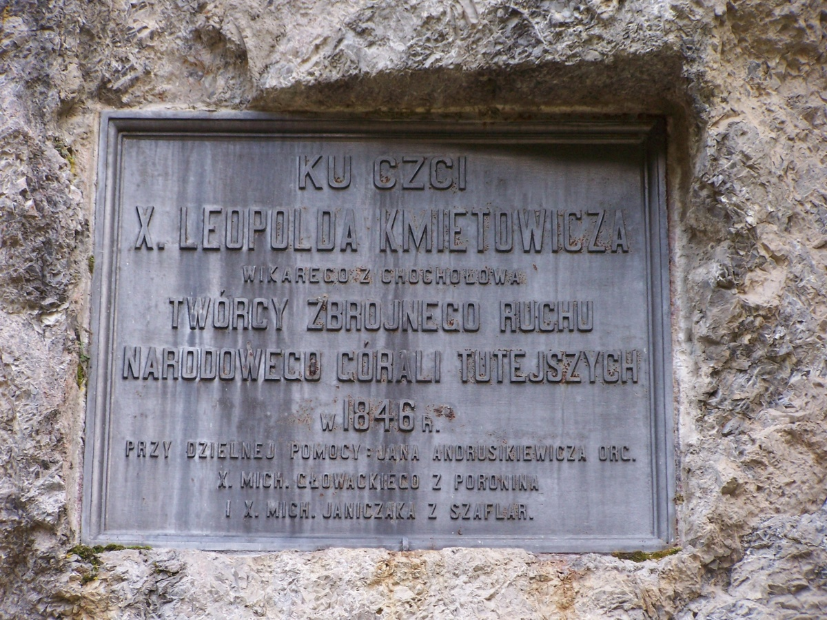 Tablica ks. Kmietowicza na Skale Kmietowicza w Dolinie Chochołowskiej